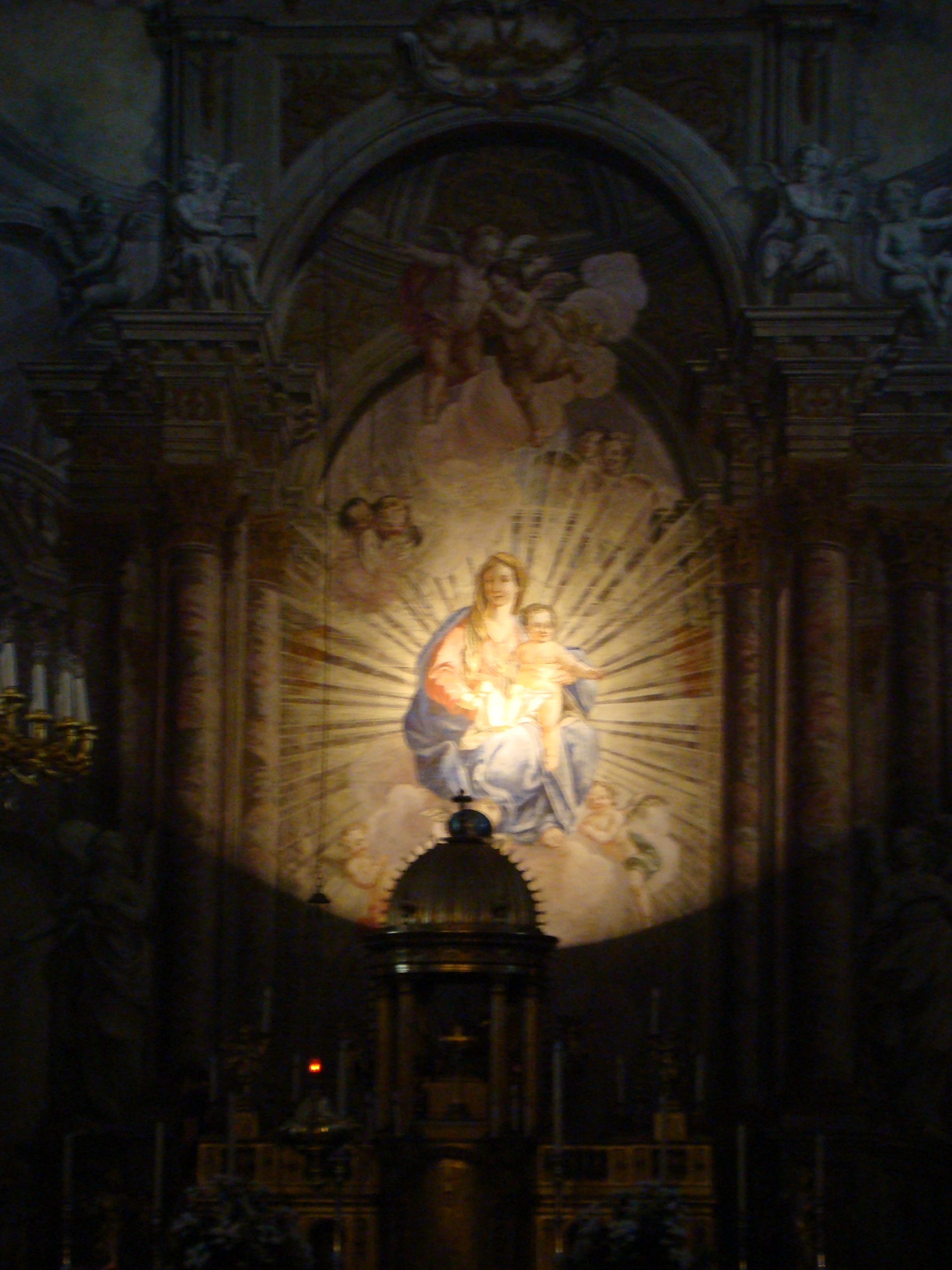 Biserica parohială romano-catolică din Sibiu